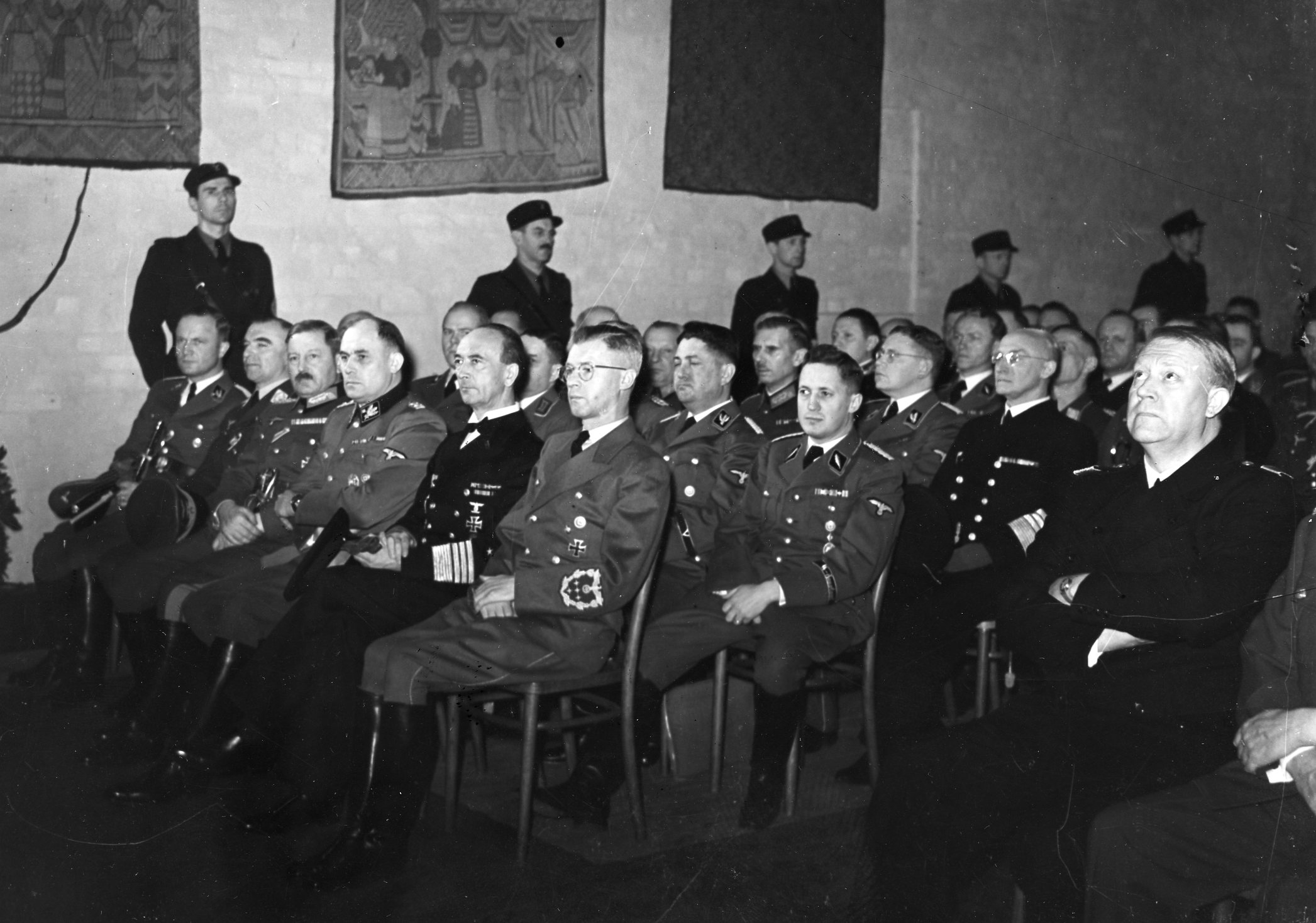 RA/PA-1209/Ue 94/ img056 «Statsakten» var en seremoni på Akershus slott i Oslo under andre verdenskrig 1. februar 1942 da rikskommissar Josef Terboven innsatte Vidkun Quisling, leder for Nasjonal Samling (NS), som «ministerpresident» i Norge, og de tyskkontrollerte kommissariske ministerne ble erstattet av «den nasjonale regjering» utgått fra NS. «Statsakten» markerte at Quisling fikk den formelle makta i Norge, og ved lov av 12. mars 1942 ble NS «statsbærende parti». Quisling hadde håp om at ordninga også skulle gi NS reell makt og føre til fred mellom Norge og Tyskland, men tysk tilsynsforvaltninga gjennom Reichskommissariat Norwegen fortsatte som før inntil frigjøringa 8. mai 1945.